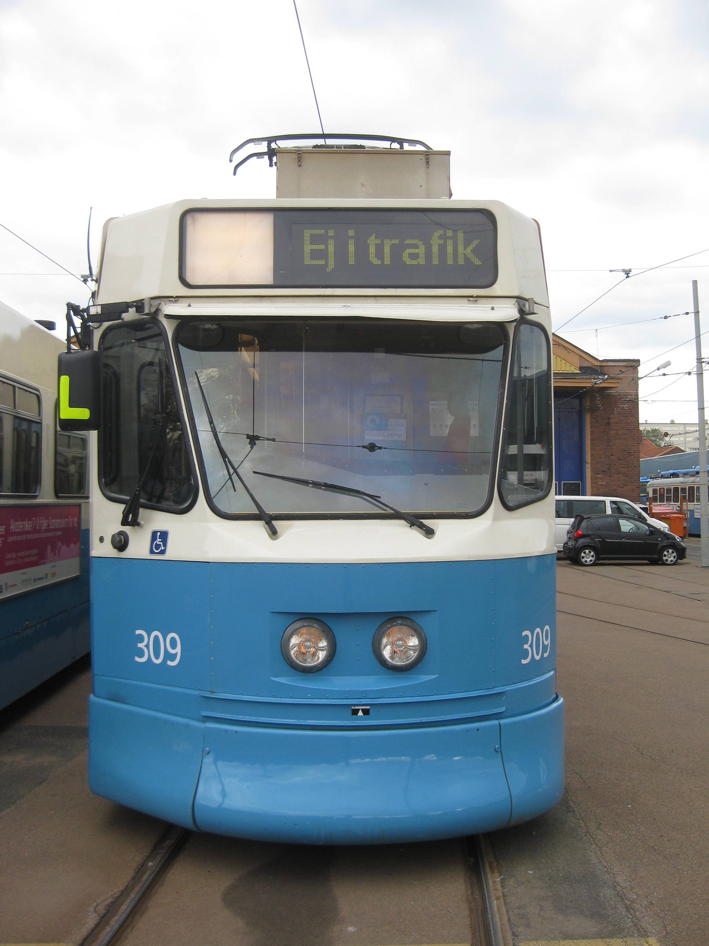 Spårvagn 309 av typen M31 utanför Vagnhallen Majorna i Göteborg.